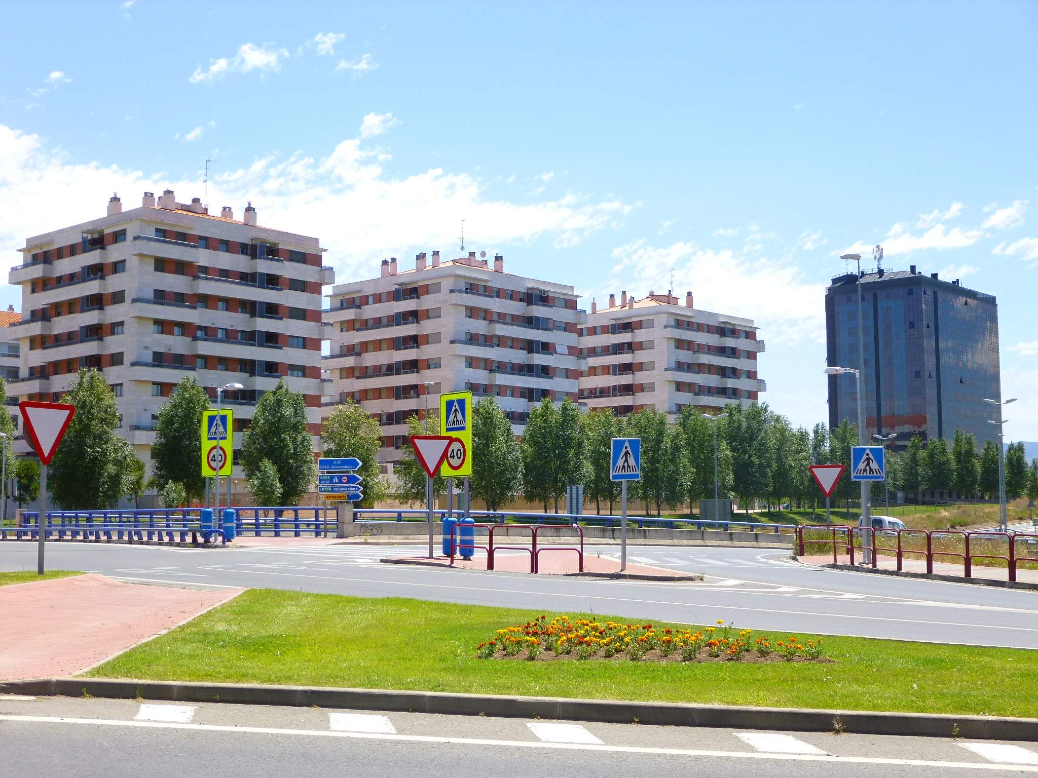 Barrio de Los Lirios, en Logroño